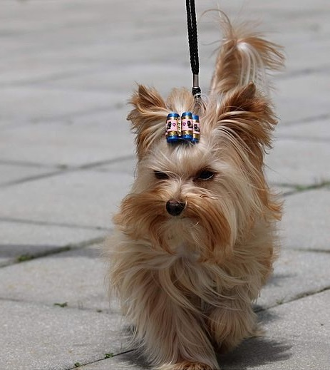 Colorful yorkshire terrier - Golddust